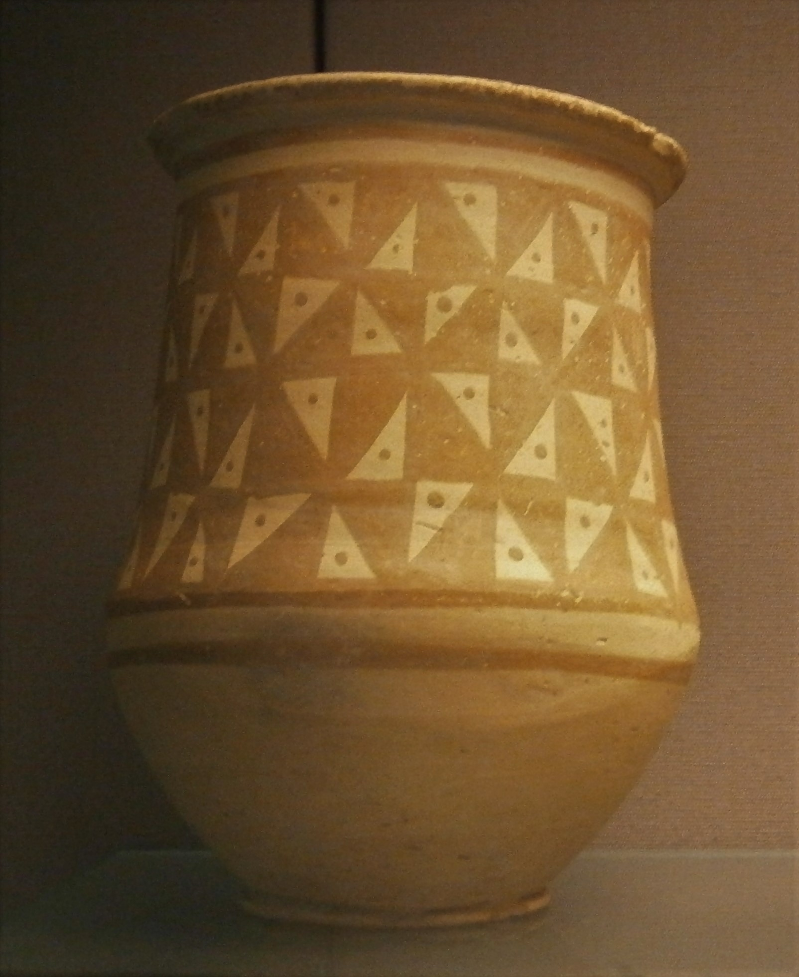 Jarre caractéristique de la céramique du Khabur, première moitié du IIe millénaire av. J.-C. Peintures à motifs de triangles et bandes. Tell Brak. ME 125934.